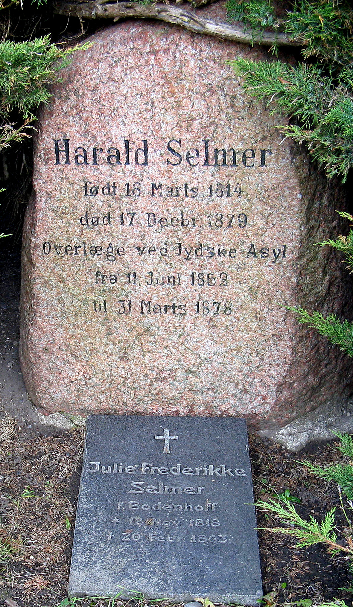 Harald Selmers gravsten (18. marts 1814 - 17. november 1879) på kirkegården ved Psykiatrisk Hospital i Risskov / Århusuniversitetshospital, Risskov